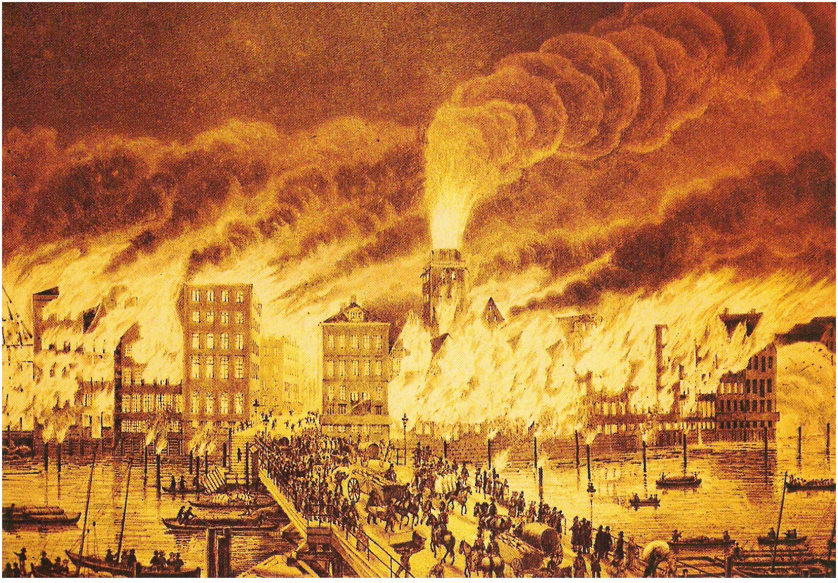 Der Große Brand von 1842, gemalt von Peter Suhr 1842